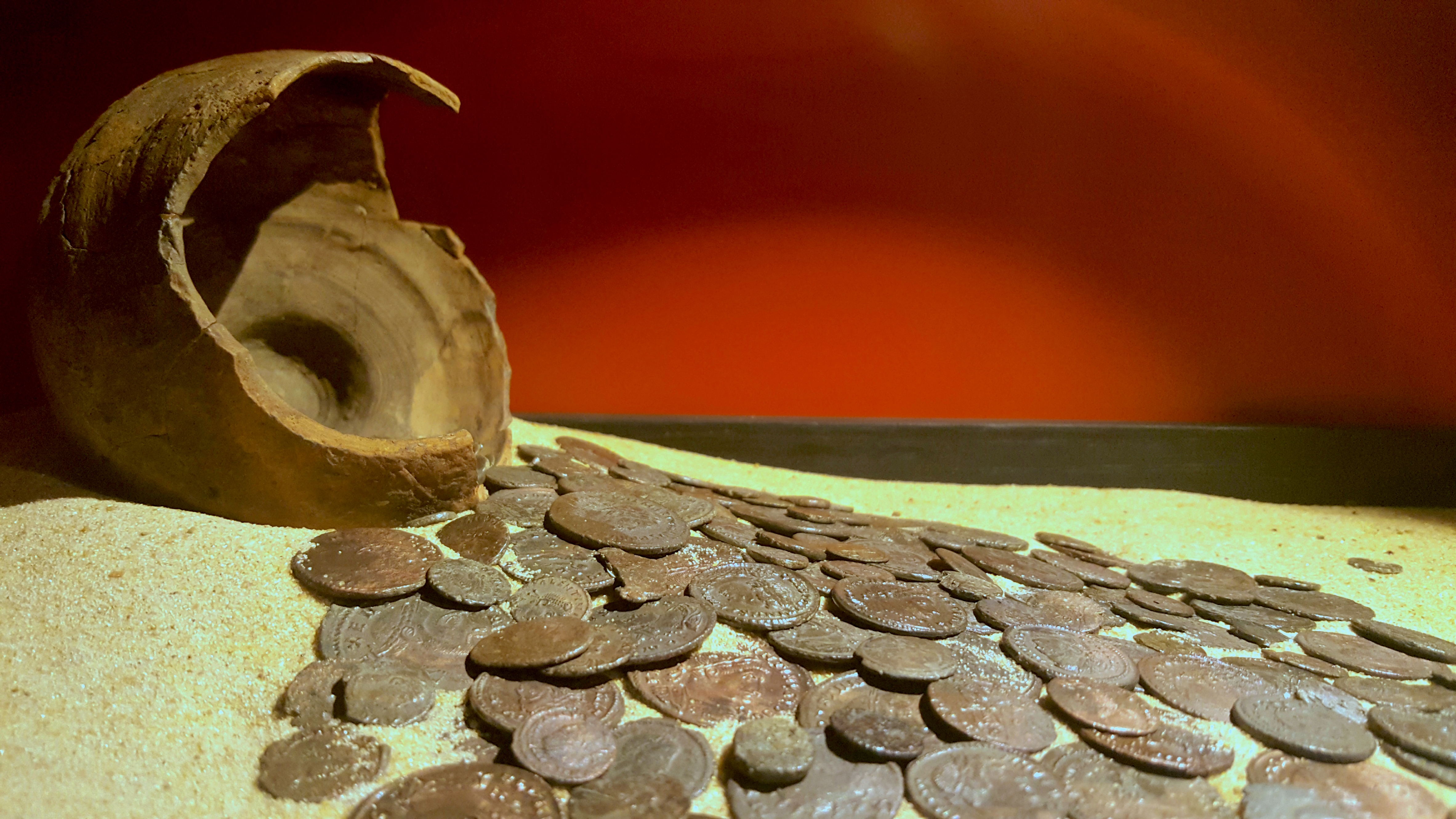 Trésor monétaire du IVème siècle trouvé en 2000 au fond du lac de Cazaux et Sanguinet.